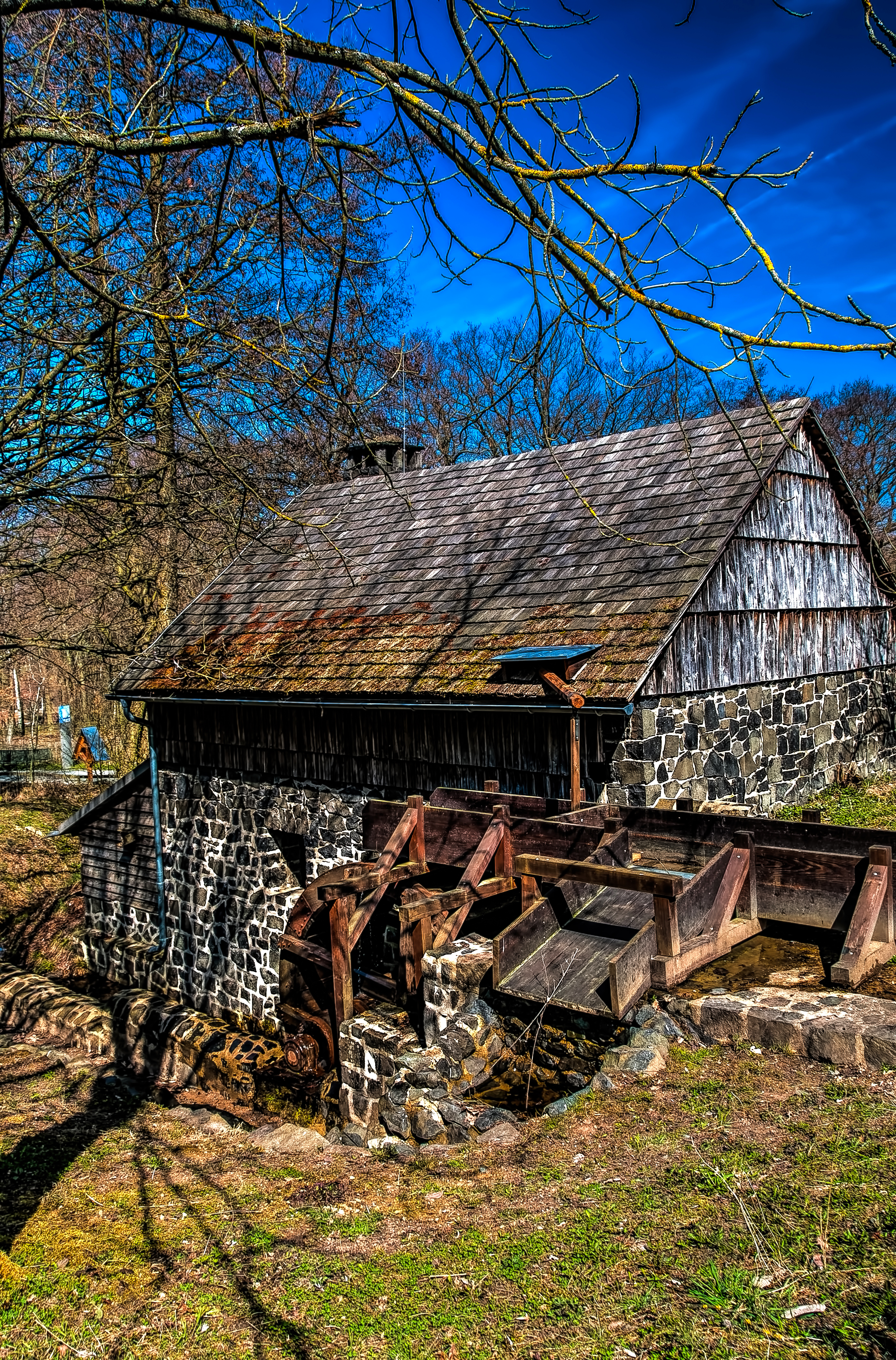 Der Auhammer, ein Hammerwerk aus Battenberg wurde 1773 erstmals erwähnt. Sein jetziges Erscheinungsbild im Museum entspricht dem von 1873. Da hat das westfälische Eisenwerk Hasenclever & Sohn das Hammerwerk erworben. The Auhammer, a hammer mill from Battenberg was first mentioned in 1773. Their present appearance in the museum corresponds to that of 1873. Since the Westphalian Eisenwerk Hasenclever & Sohn has acquired the hammer.